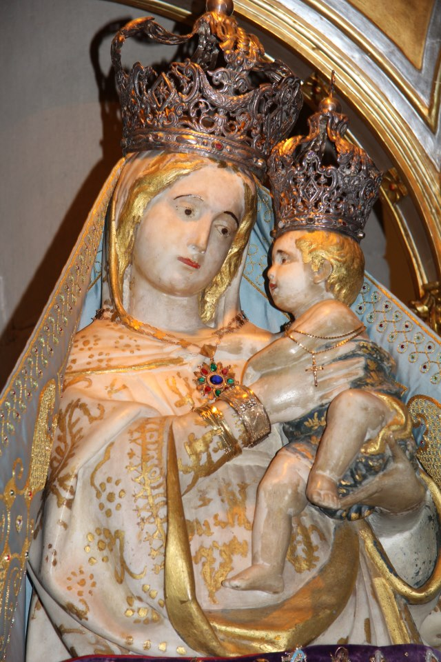 Primo piano del volto della statua della Madonna dell'Udienza attribuita ad Antonello Gagini (1526)